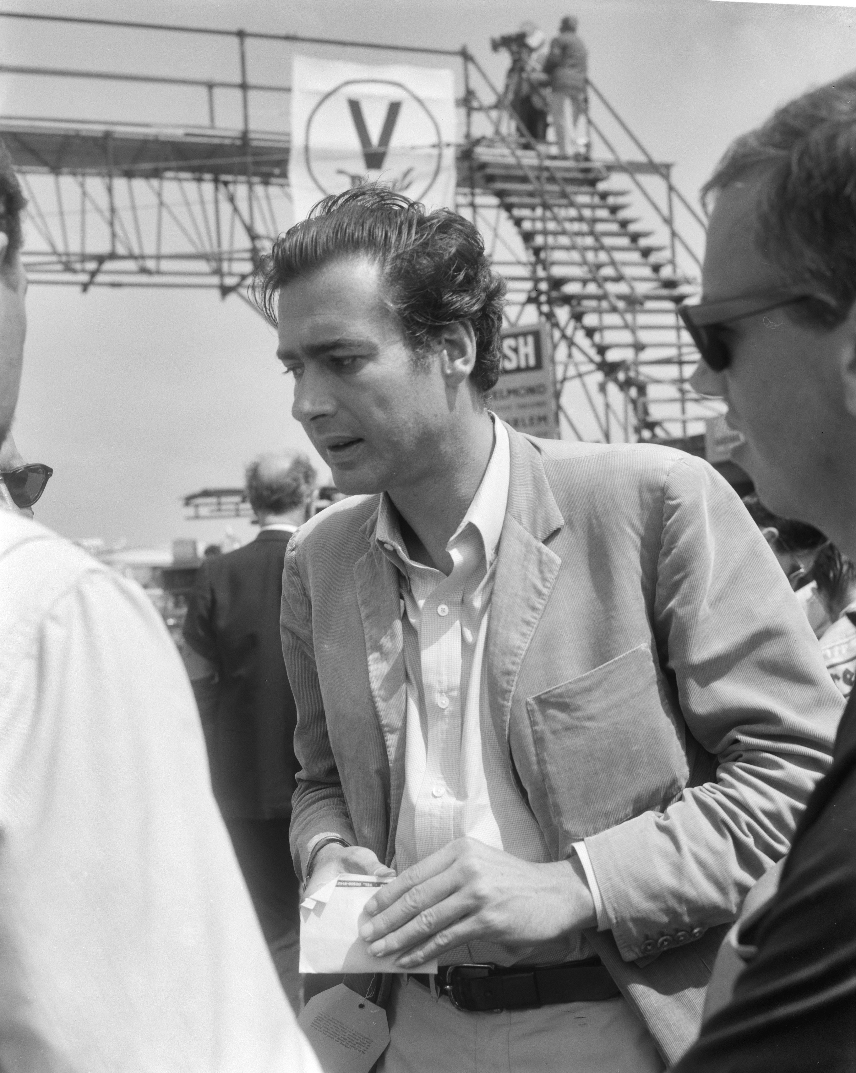 Cineramafilm Grand Prix , opname te Zandvoort, regisseur John Frankenheimer